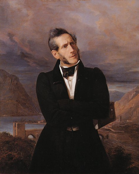 Alessandro Manzoni a 50 anni